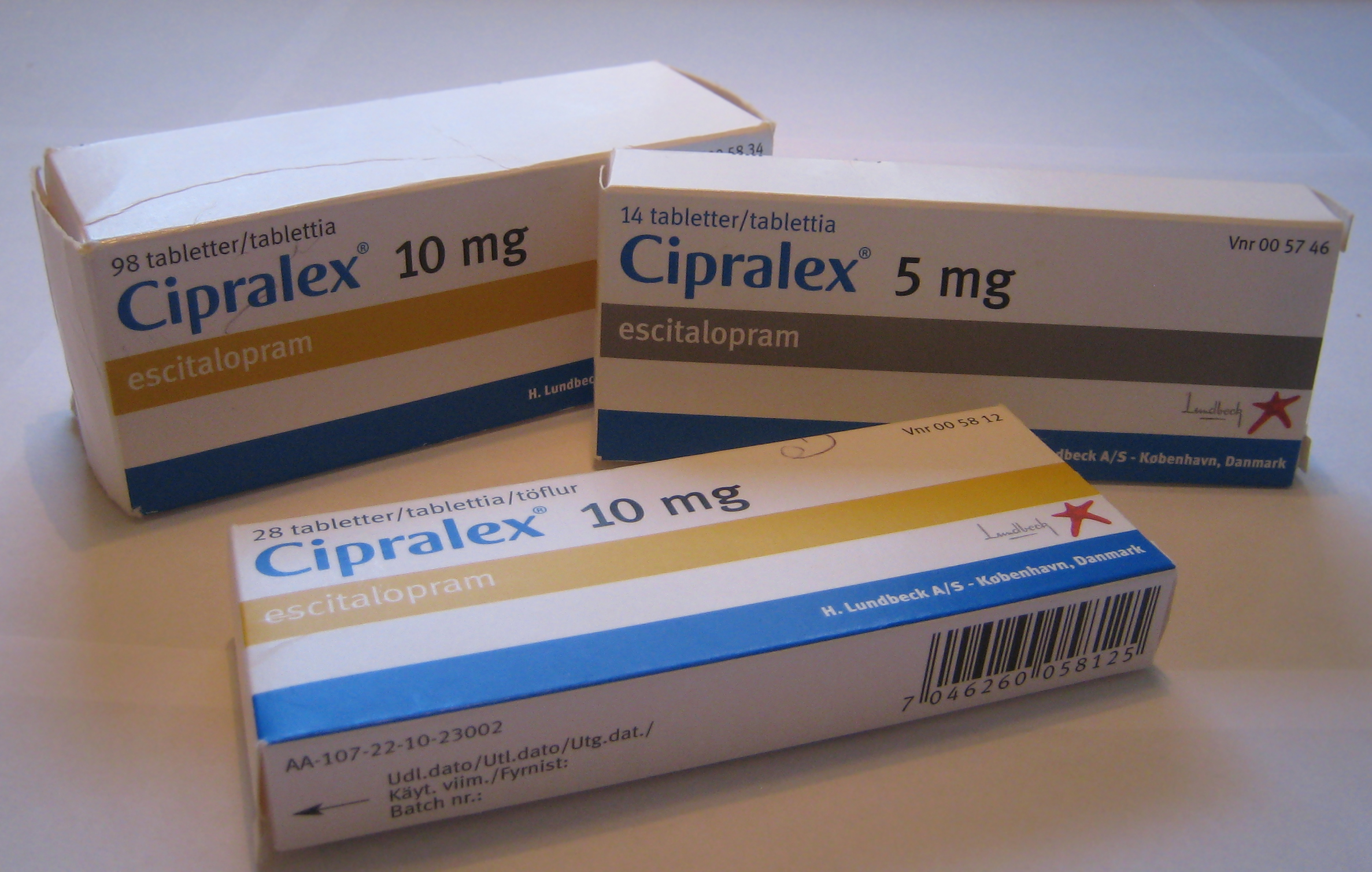 Cipralex-lääkkeen myyntipakkauksia